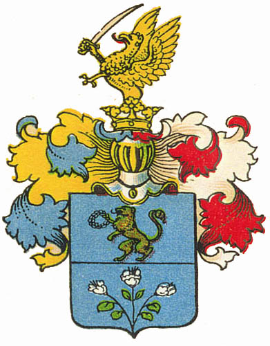 A Csiffáry család címere